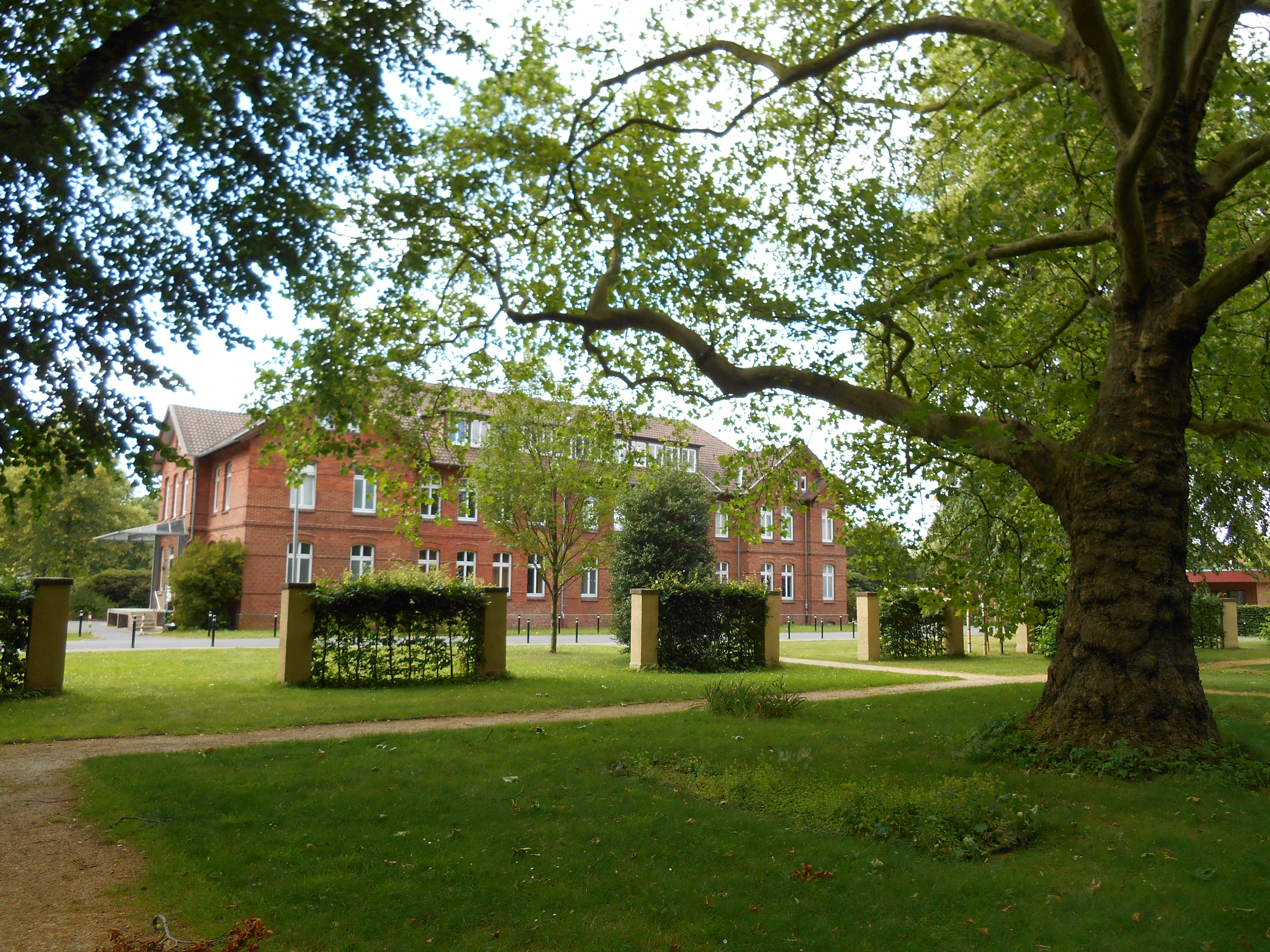 Бад Цвишенан, Психиатрическая клиника 3